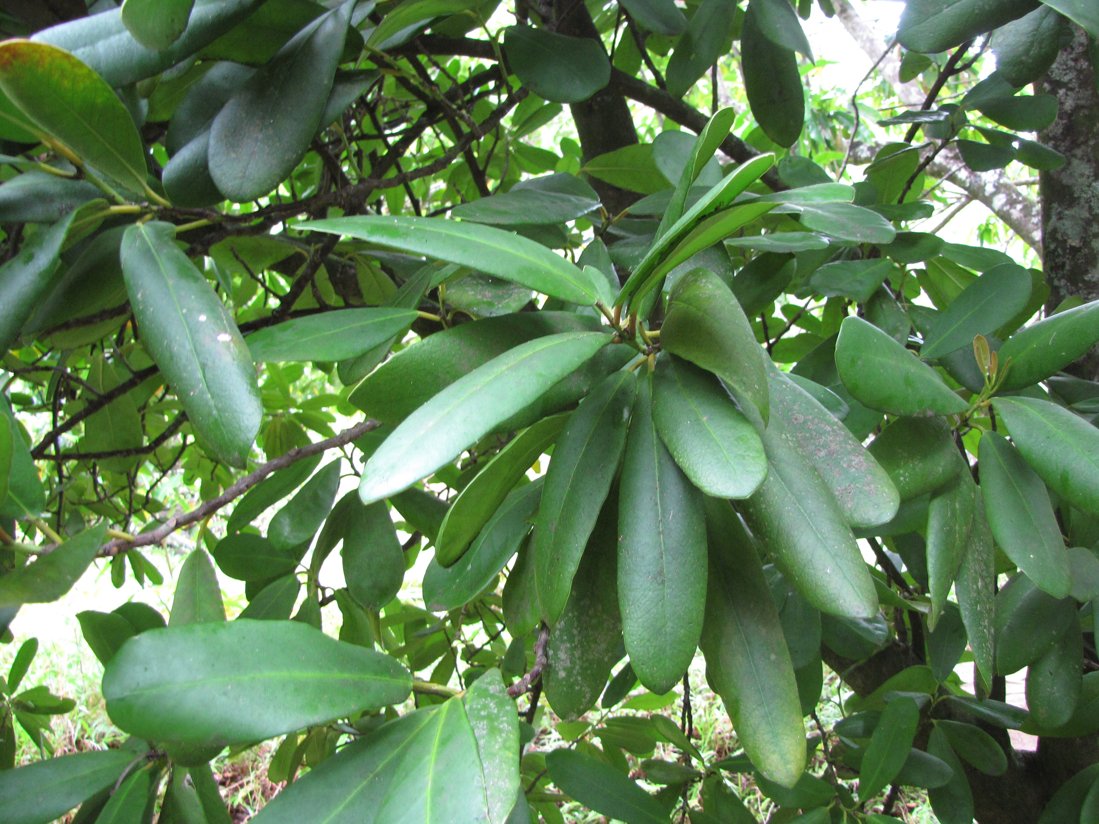 Brexia madagascariensis (Brexia) Adult leaves at Iao, Maui, Hawaii. April 30, 2010 #100430-5555 Image Use Policy Also placed in Saxifragaceae.